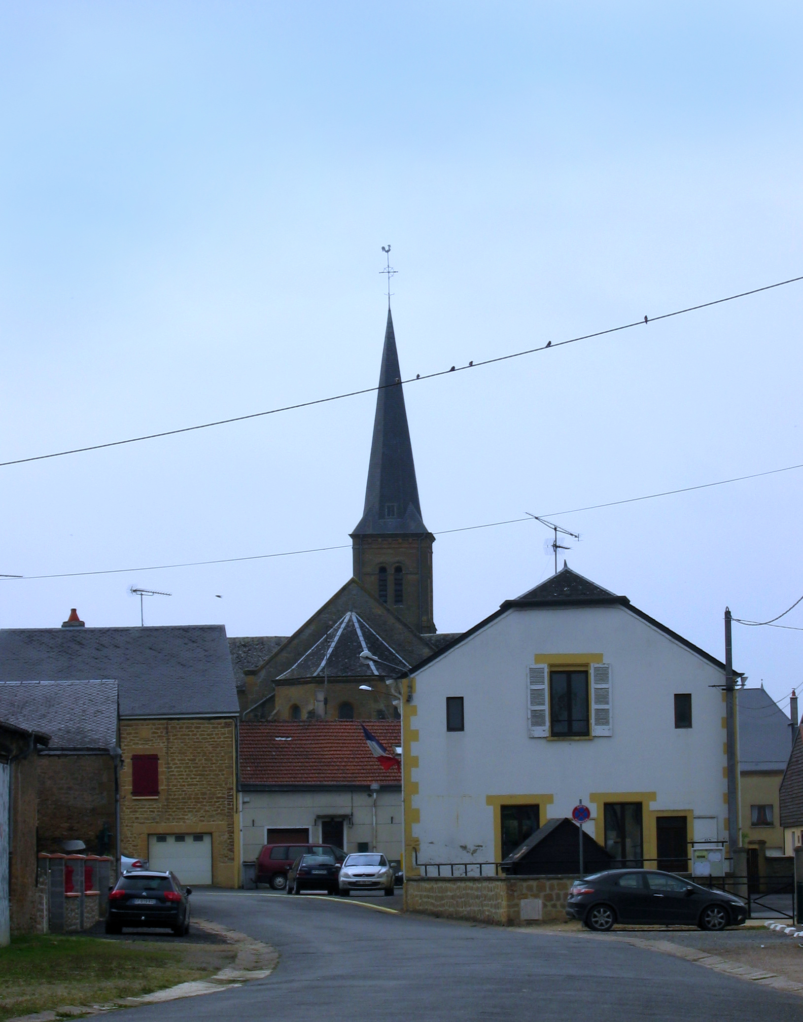 Vue du village